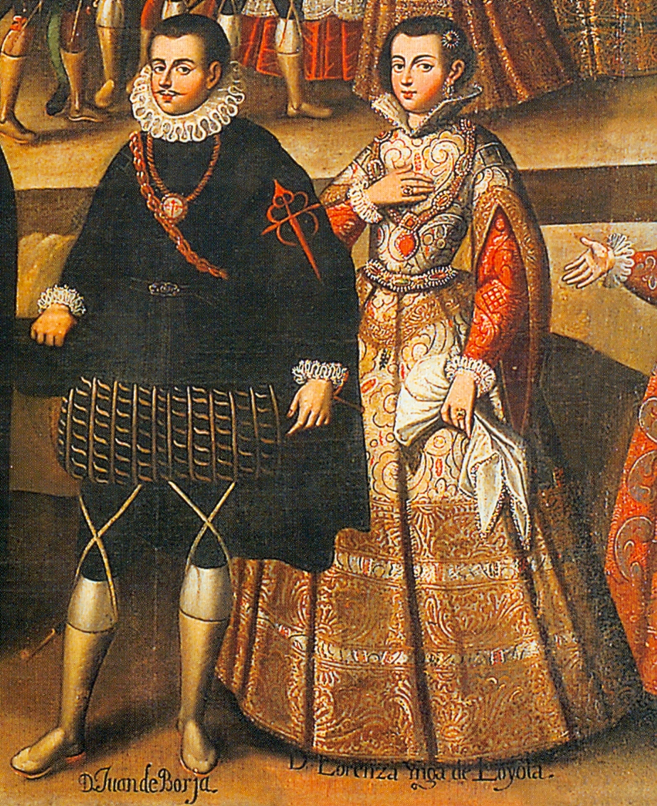 Juan de Enríquez de Borja and Ana María Lorenza de Loyola y Coya. Detail of the painting Marriage of Martin de Loyola to Princess Dona Beatriz and Don Juan Borja (Juan de Enríquez de Borja) to Lorenza (Ana María Lorenza de Loyola y Coya, daughter of Martin and Beatriz).